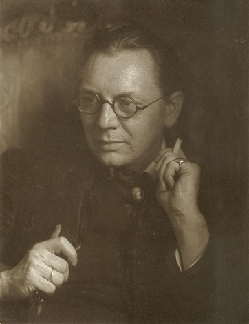 Selbstportrait des Fotografen Hugo Erfurth, c. 1915